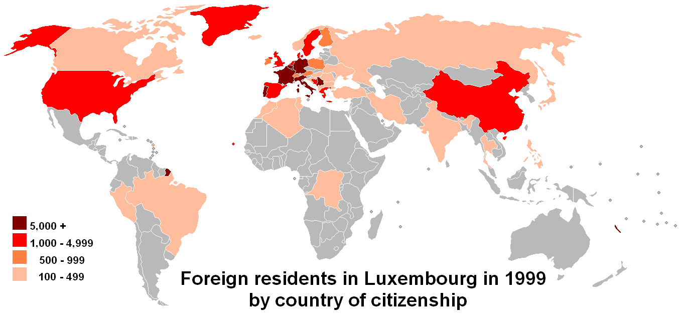 Foreign residents in Luxembourg